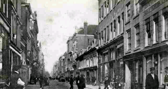 Woningen en winkelpanden aan de Oude Binnenweg in Rotterdam bij het Molenpad.